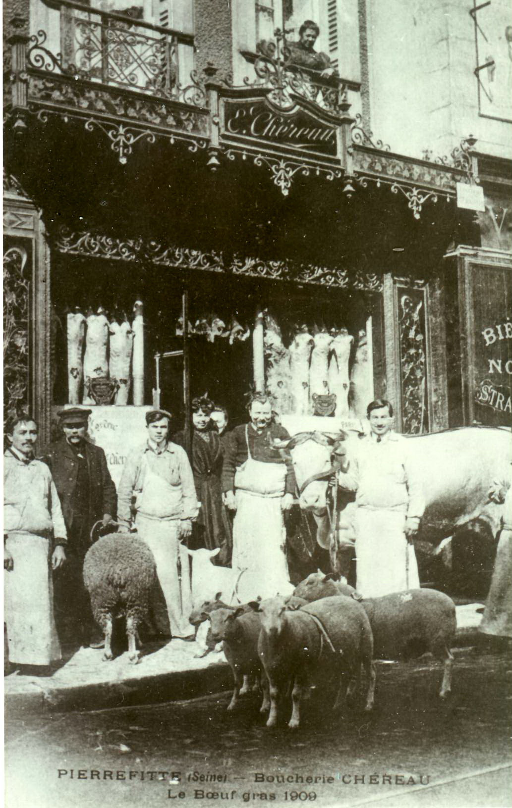 Cope de carte de commerce ancienne PIERREFITTE - Boucherie Chéreau - Le Bœuf gras 1909